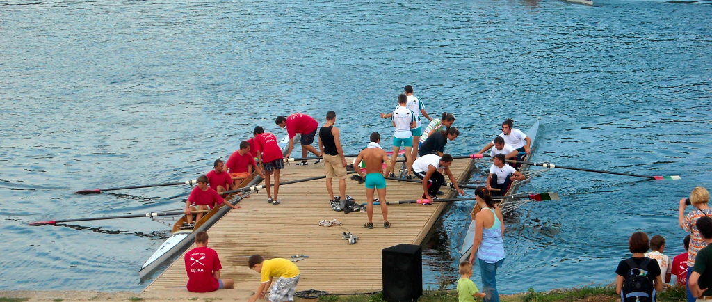 Гребна регата на Панчаревското езеро